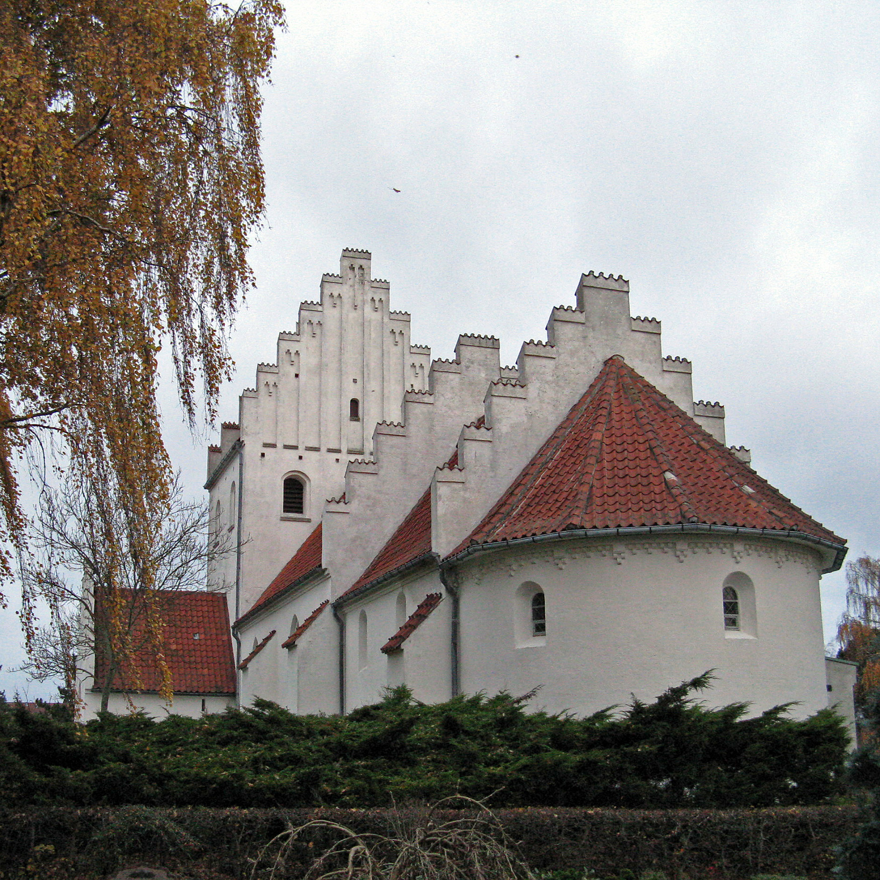 Frederikskirken ligger i Skåde Sogn i Århus Kommune. Kirken blev indviet første søndag i advent 1944